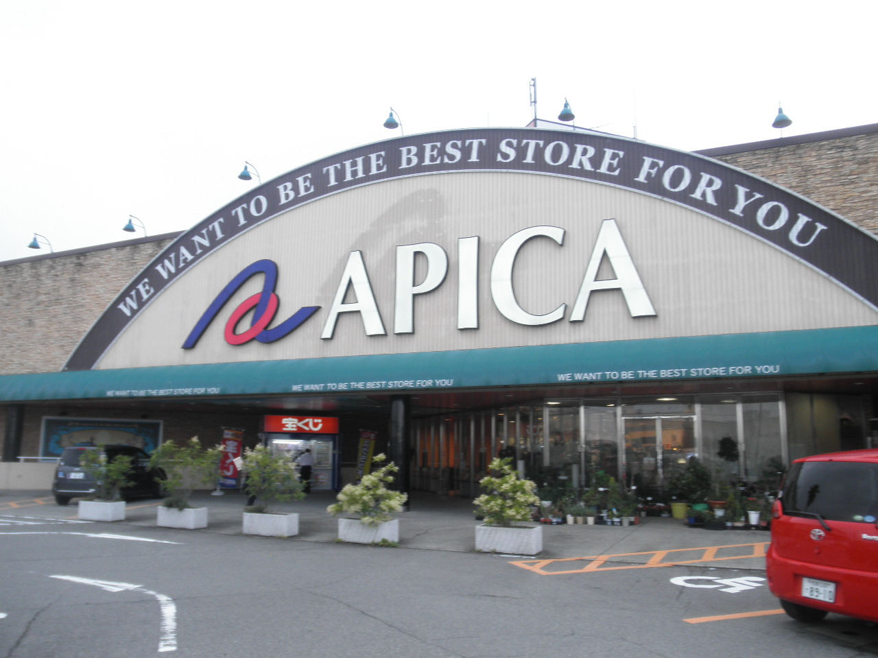 ショッピングプラザアピカ 入口